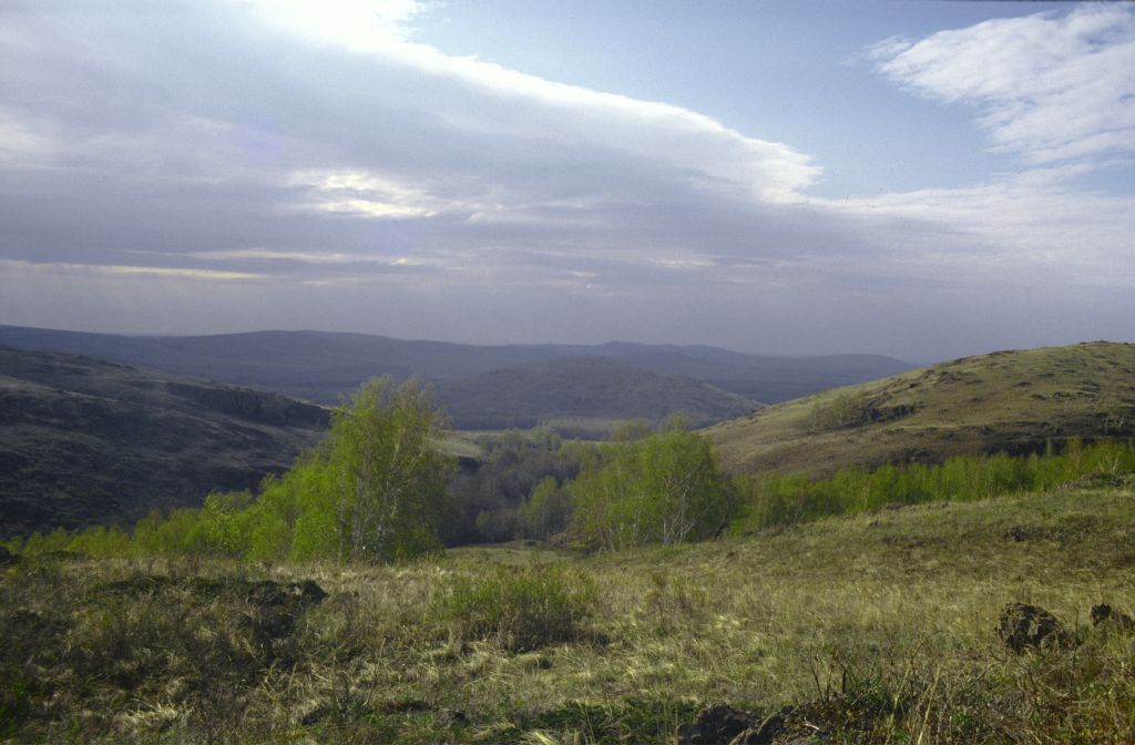 Популяции лука косого на хр. Ирендык, Баймакский район This image is related to the protected area of Russia number 0210035